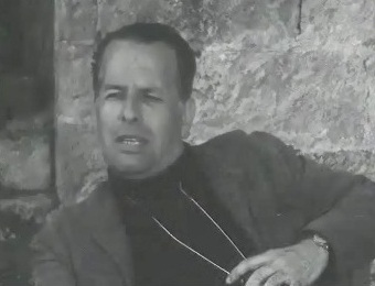 Il regista Brunello Rondi sul set de Il demonio (1963) Foto del 1963